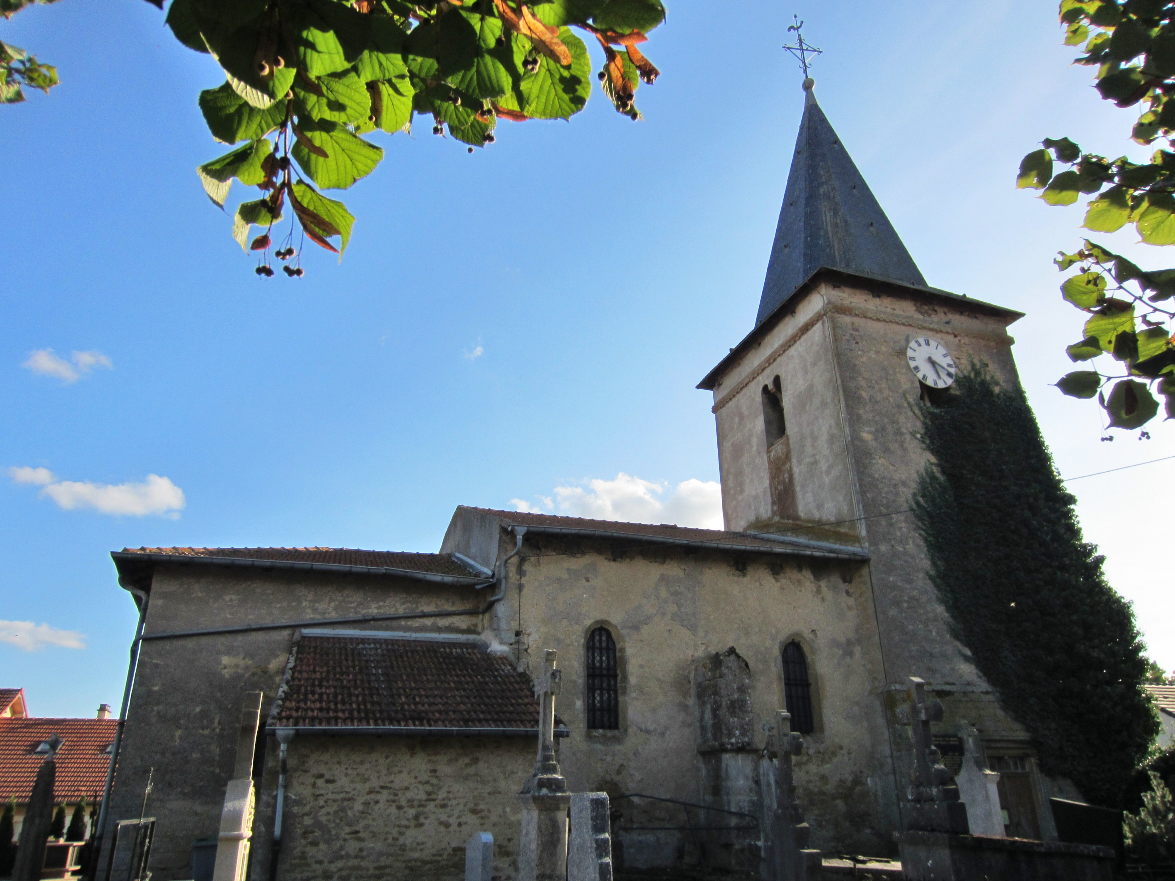 Description eglise Lubey eglise Lubey